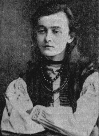 Larissa Vasil'evna Čemodanova Sinegub (1856-1923)